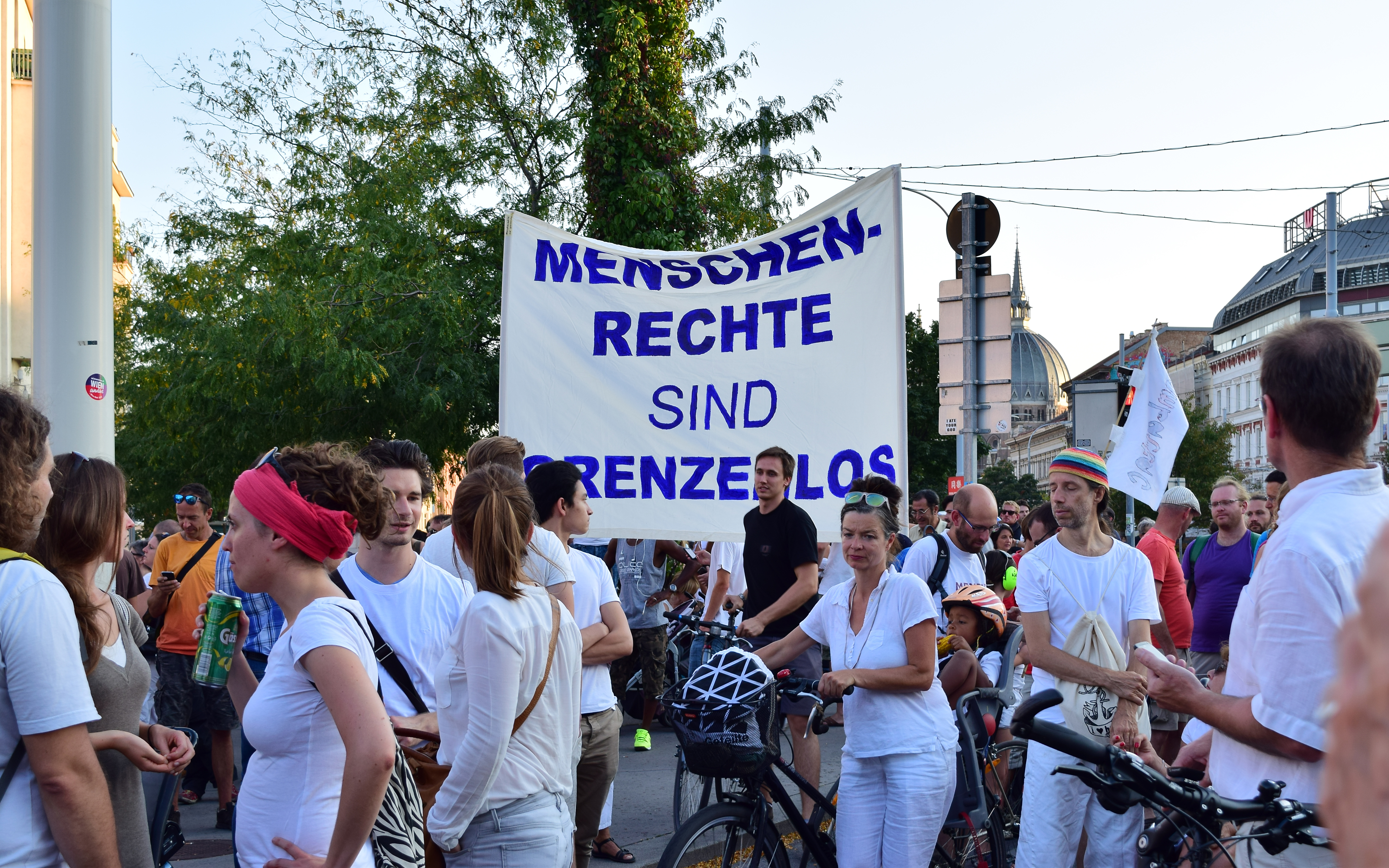 Aufnahme von der Demo "Mensch sein in Österreich" am 31. August 2015, an der über 20.000 Menschen teilnahmen. Trauriger Anlass war die Flüchtlingstragödie bei Parndorf. Die Demo wurde von Privatpersonen initiiert und von verschiedenen Organisationen unterstützt, die sich für ein Öffnen der Grenzen der Festung Europa einsetzen, um dem Sterben auf den Fluchtrouten ein Ende zu bereiten und den Schleppern die Grundlage für ihre Geschäfte zu entziehen.